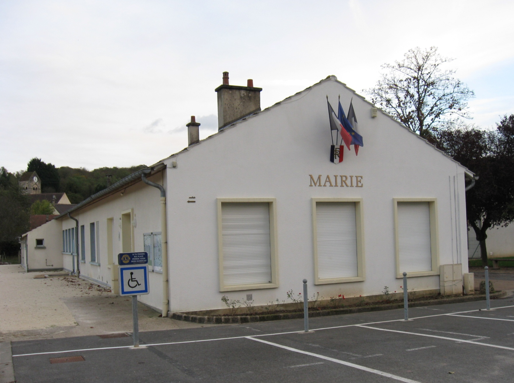 Mairie de Domptin. (département de l'Aisne, région Picardie).